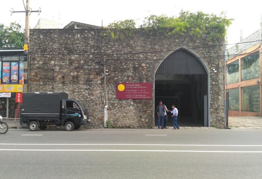 සිංහල: 616, නුගේගොඩ ඉදිකර ඇති තාක්ෂණ පීඨය